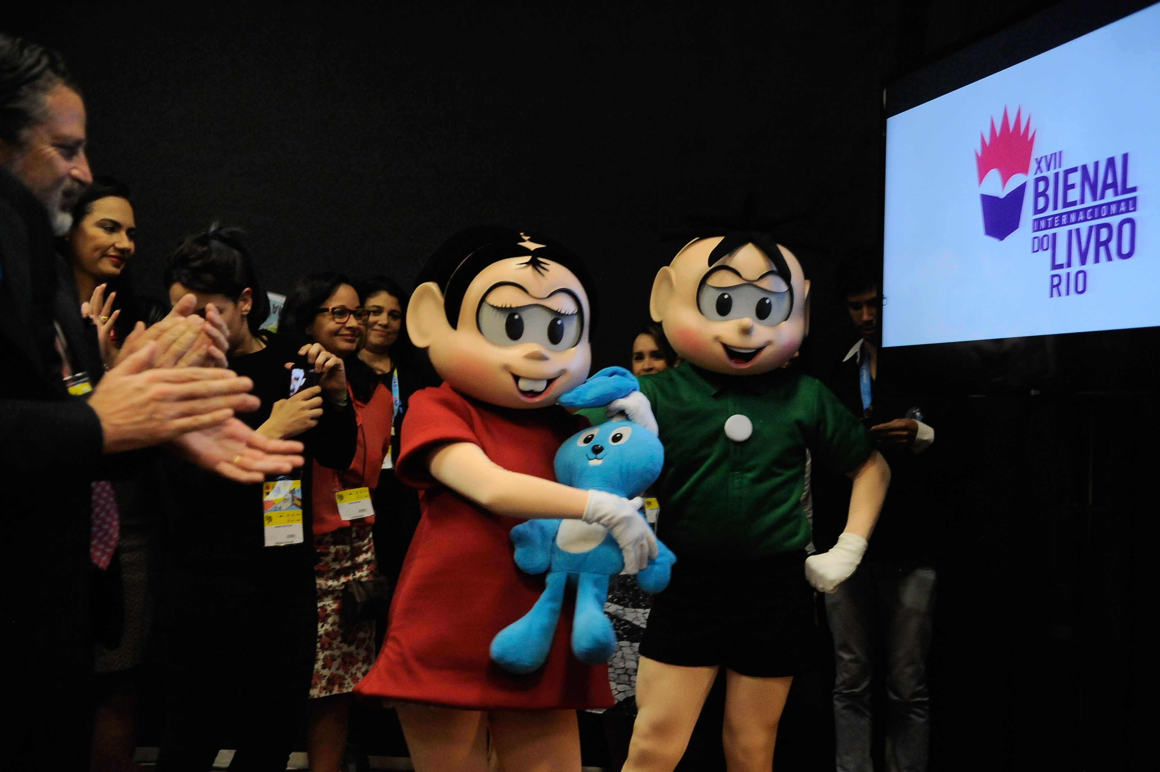 Turma da Mônica na 17ª Bienal Internacional do Livro do Rio de Janeiro, participa da abertura no Riocentro.